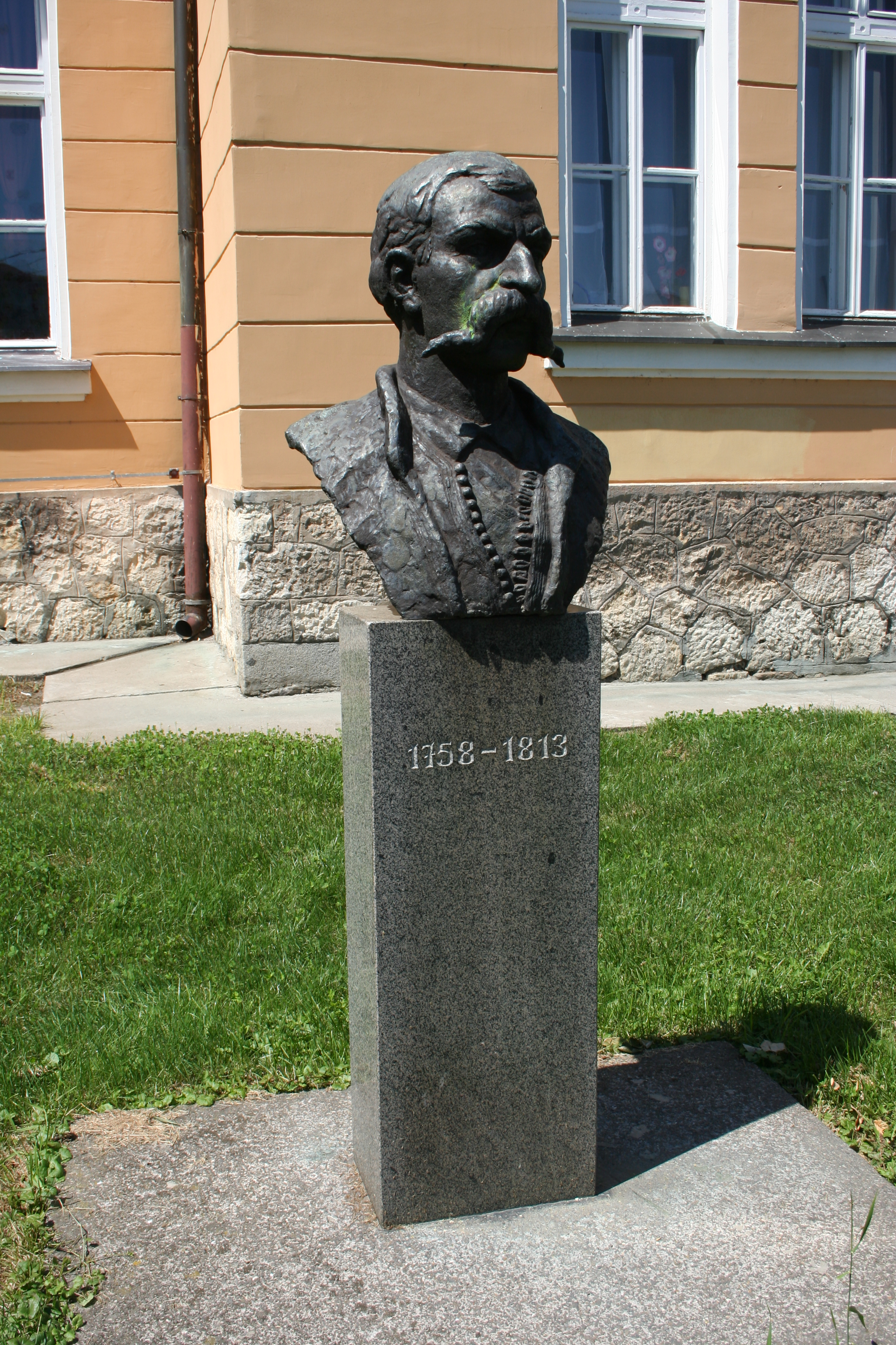 Spomenik Ante Bogićevića, Loznica